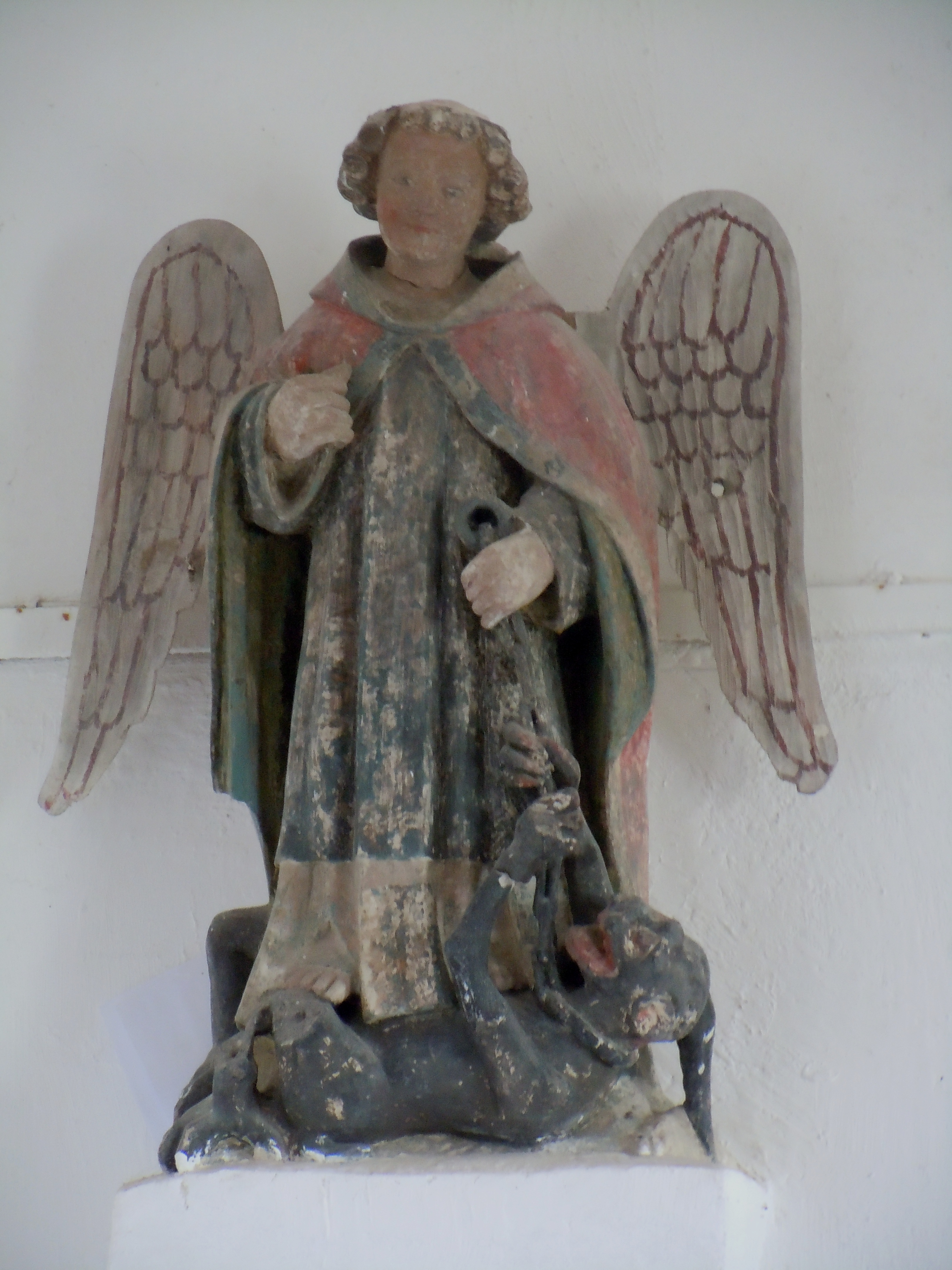 Clermont en Auge - Saint Michel terrassant le démon - Calvados - France - 15e siècle